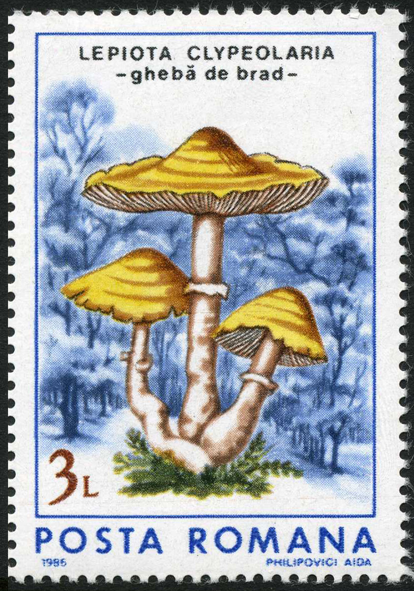 Lepiota clypeolaria (Bull.) P. Kumm. on Romanian stamp (1986, 3 lei, Michel №4291)